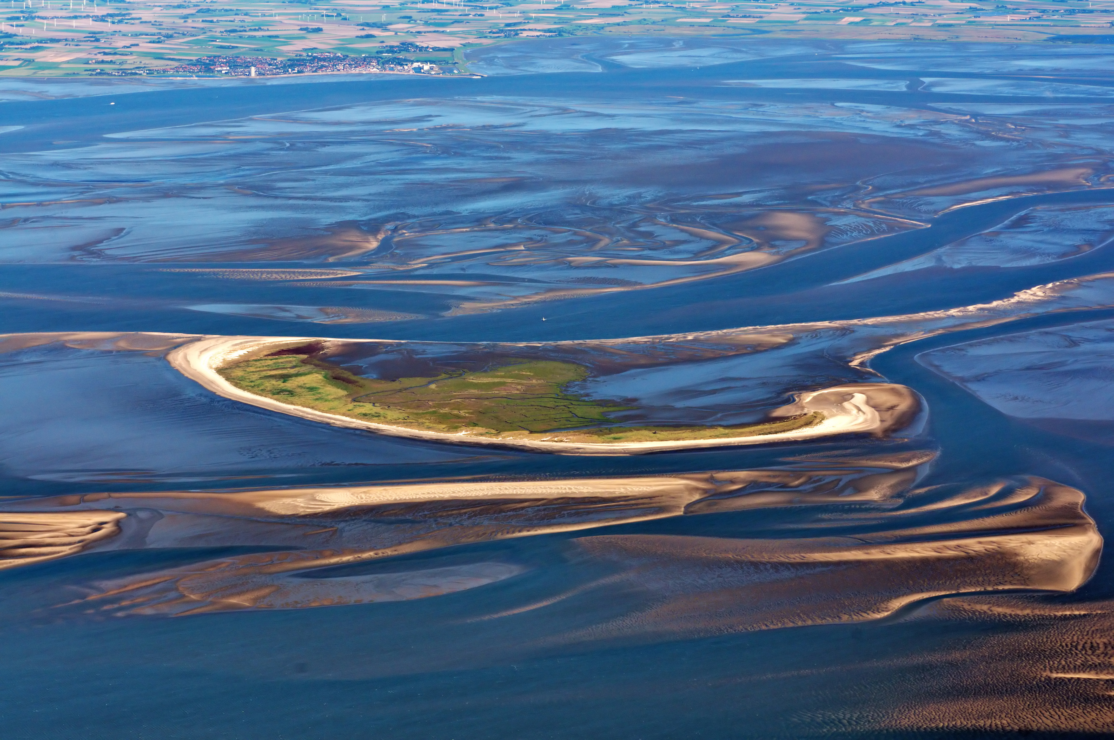 Fotoflug über das nordfriesische Wattenmeer - Trischen (von SW), im Hintergrund Büsum